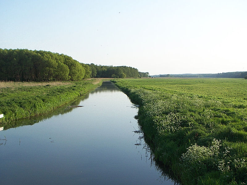 Recknitztal bei Cammin, FFH-Gebiet DE-1941-301 „Recknitz- und Trebeltal mit Zuflüssen“